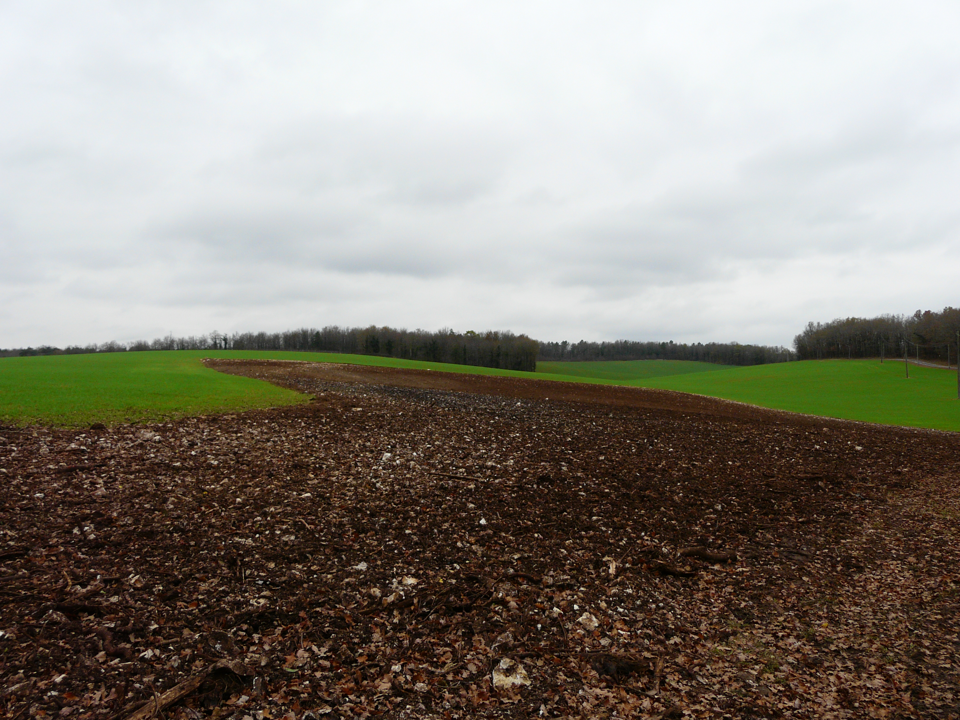 Le causse de Cubjac au nord du lieu-dit les Rouverades, Cubjac, Dordogne, France.